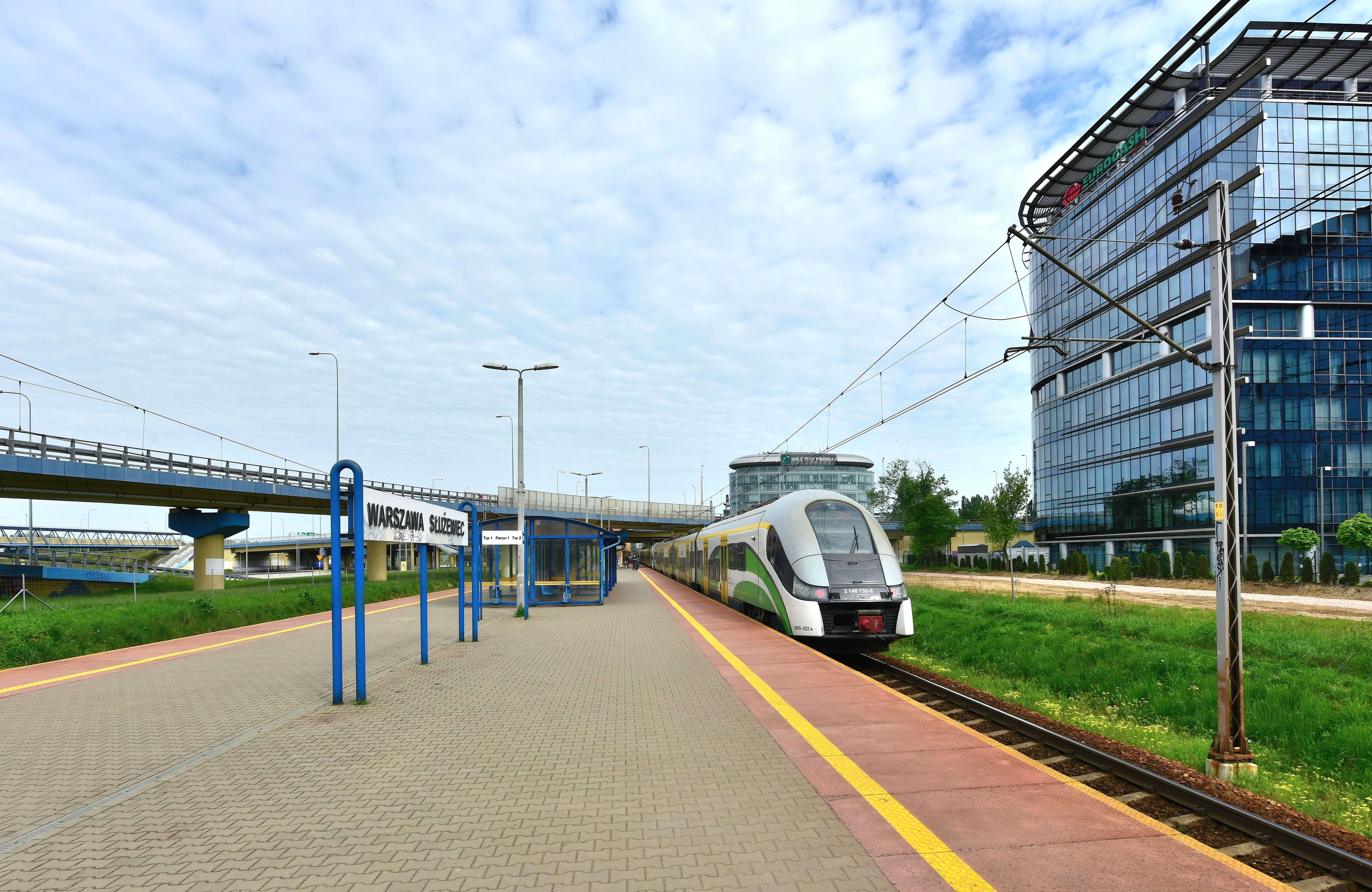 Przystanek kolejowy Warszawa Służewiec w Warszawie